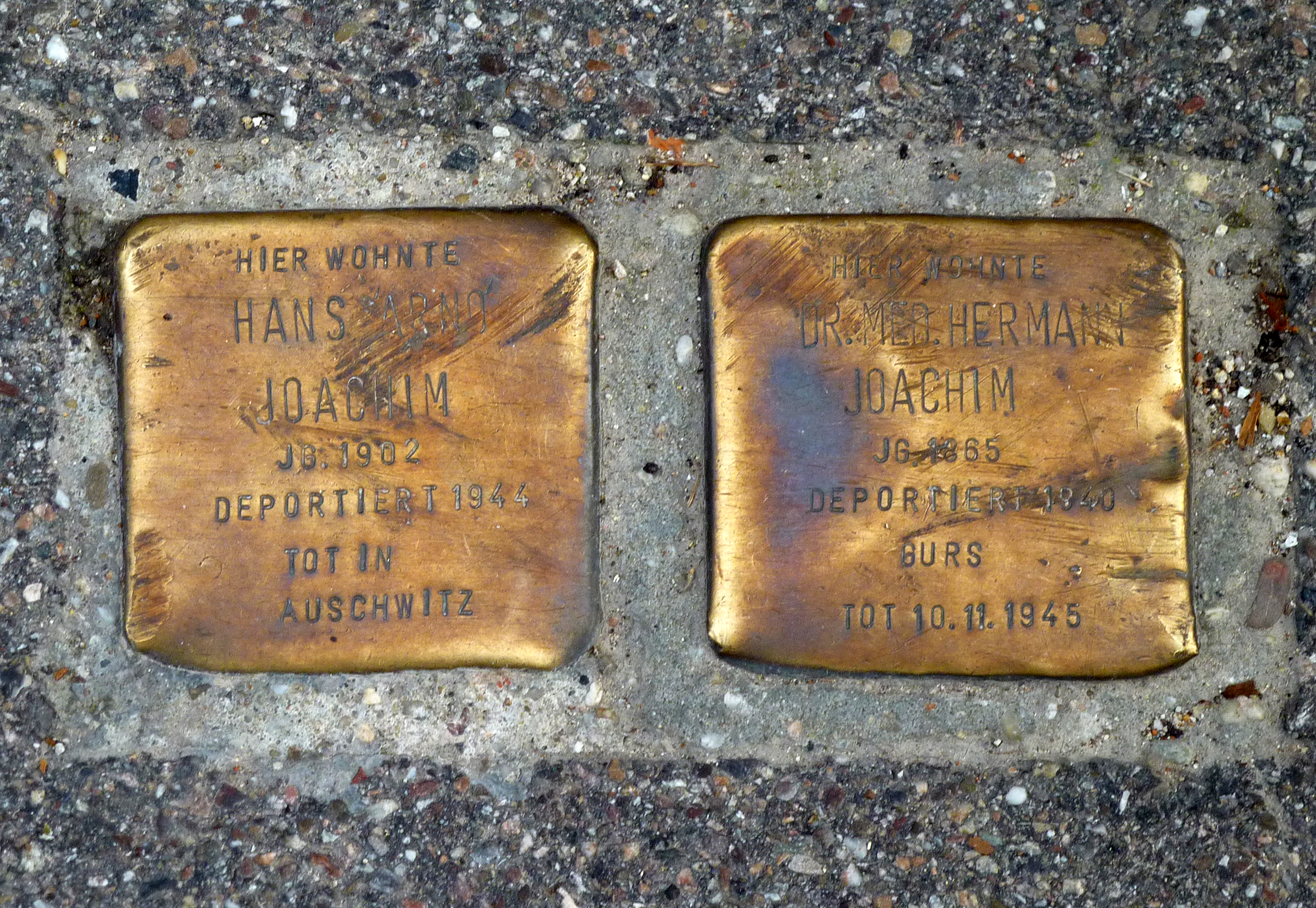 Stolpersteine für Hans Arno Joachim und Dr. med. Hermann Joachim vor dem Haus Friedrichstraße 54, Freiburg